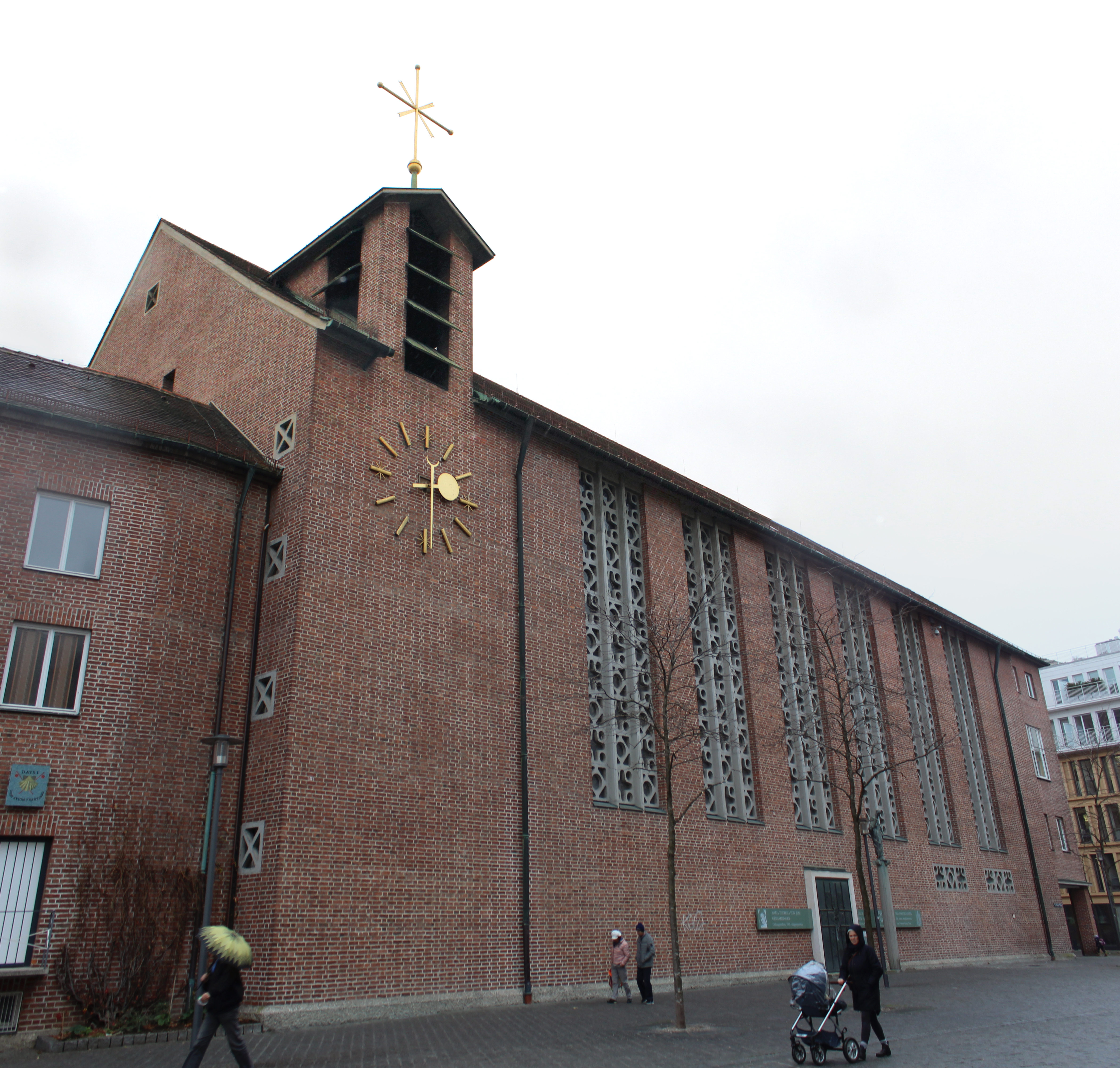 Église Saint-Jakob de Munich.